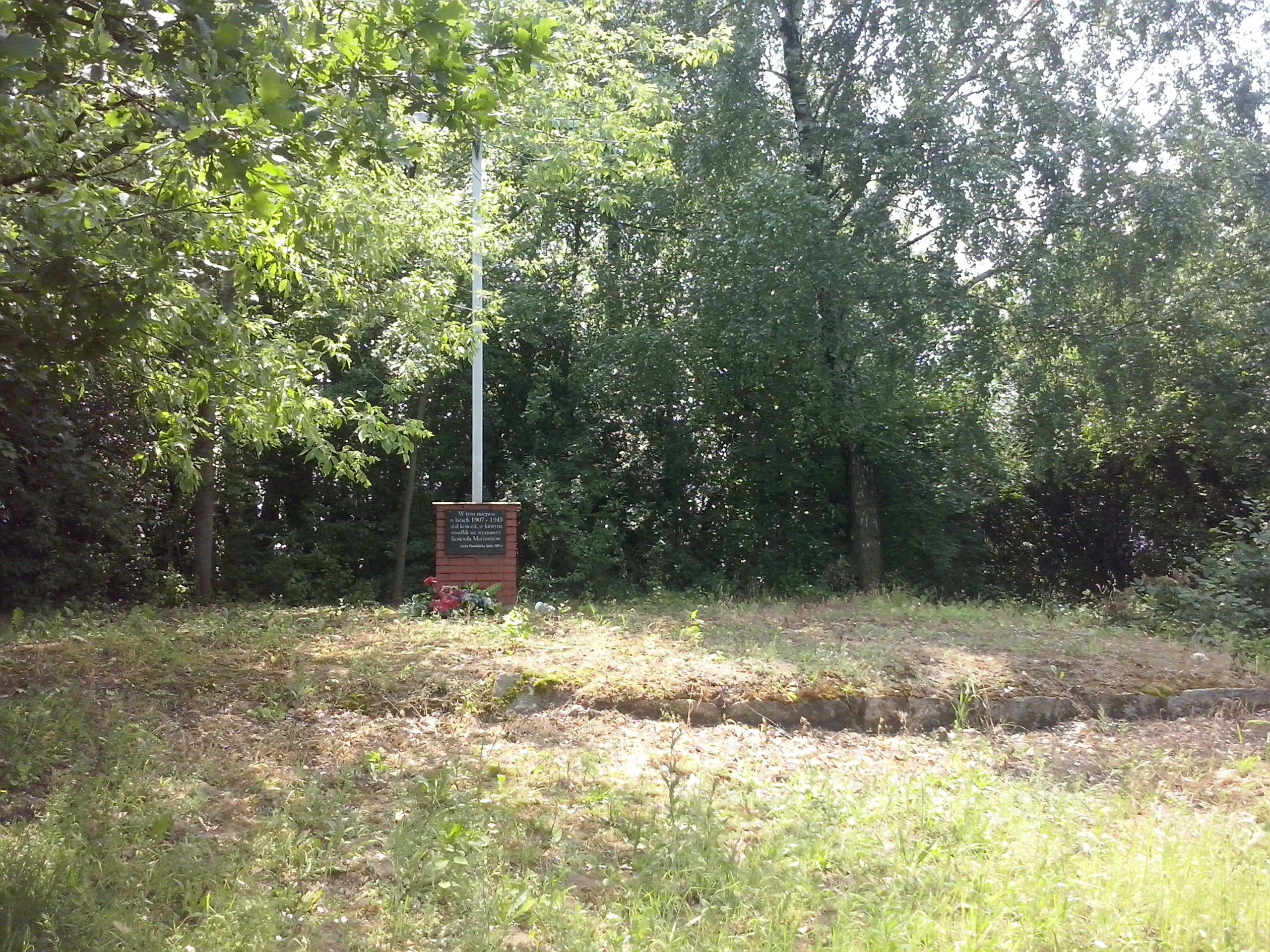 Górka Powielińska (gm. Winnica, pow. Pułtusk) - miejsce po dawnym drewnianym kościele mariawickim